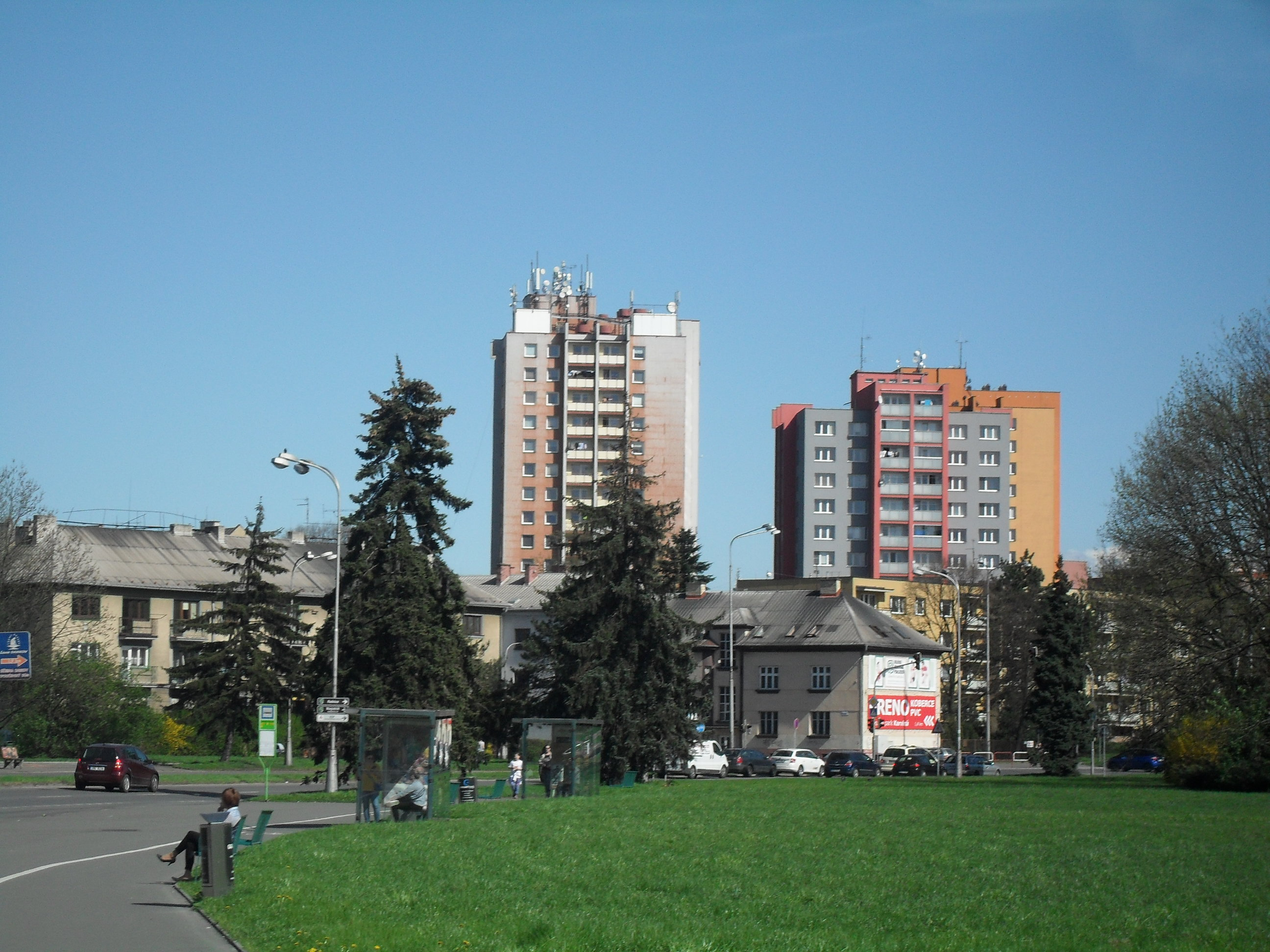 Centrum Karviné